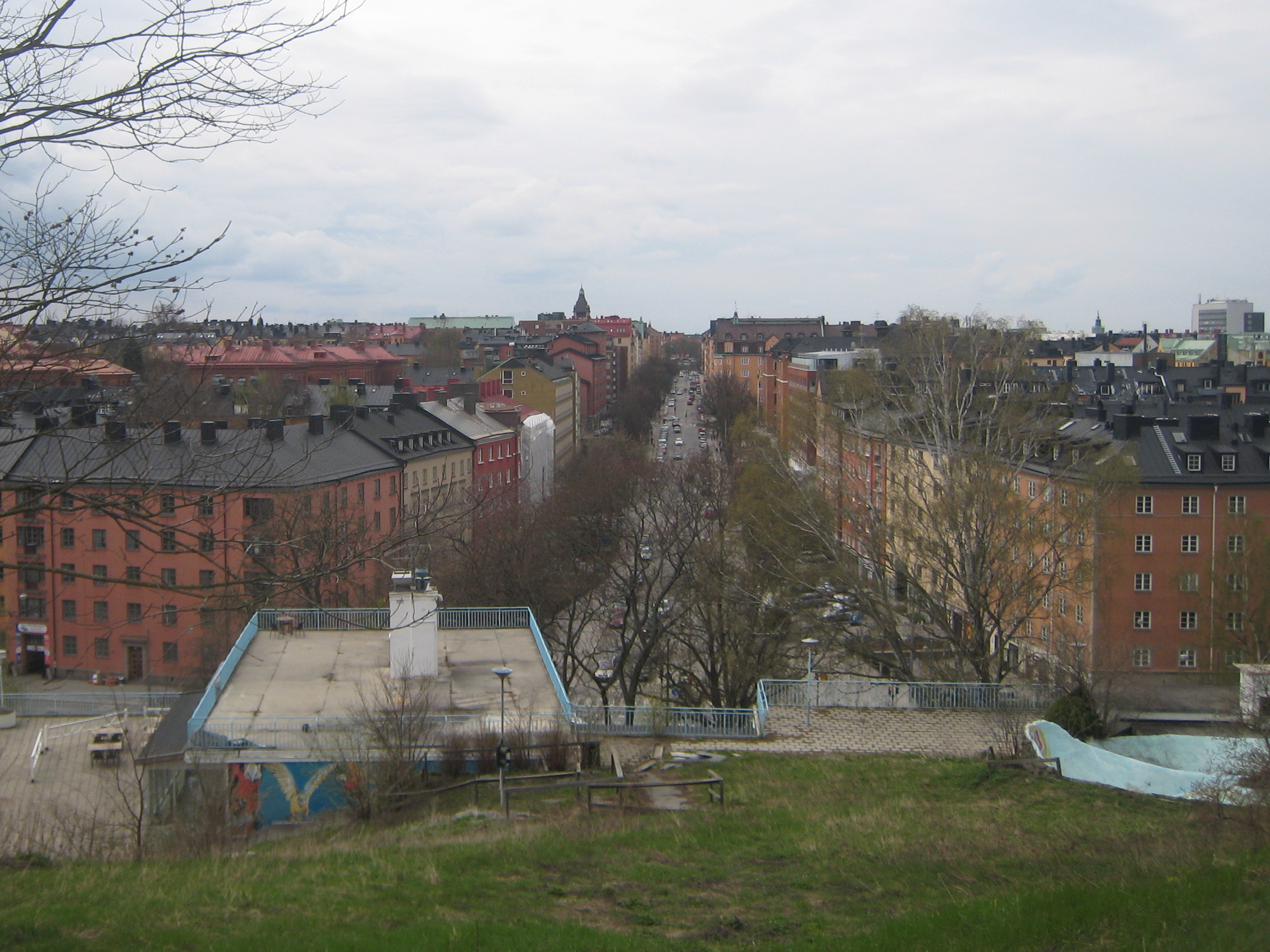 Vanadisvägen seen from Vanadislunden.